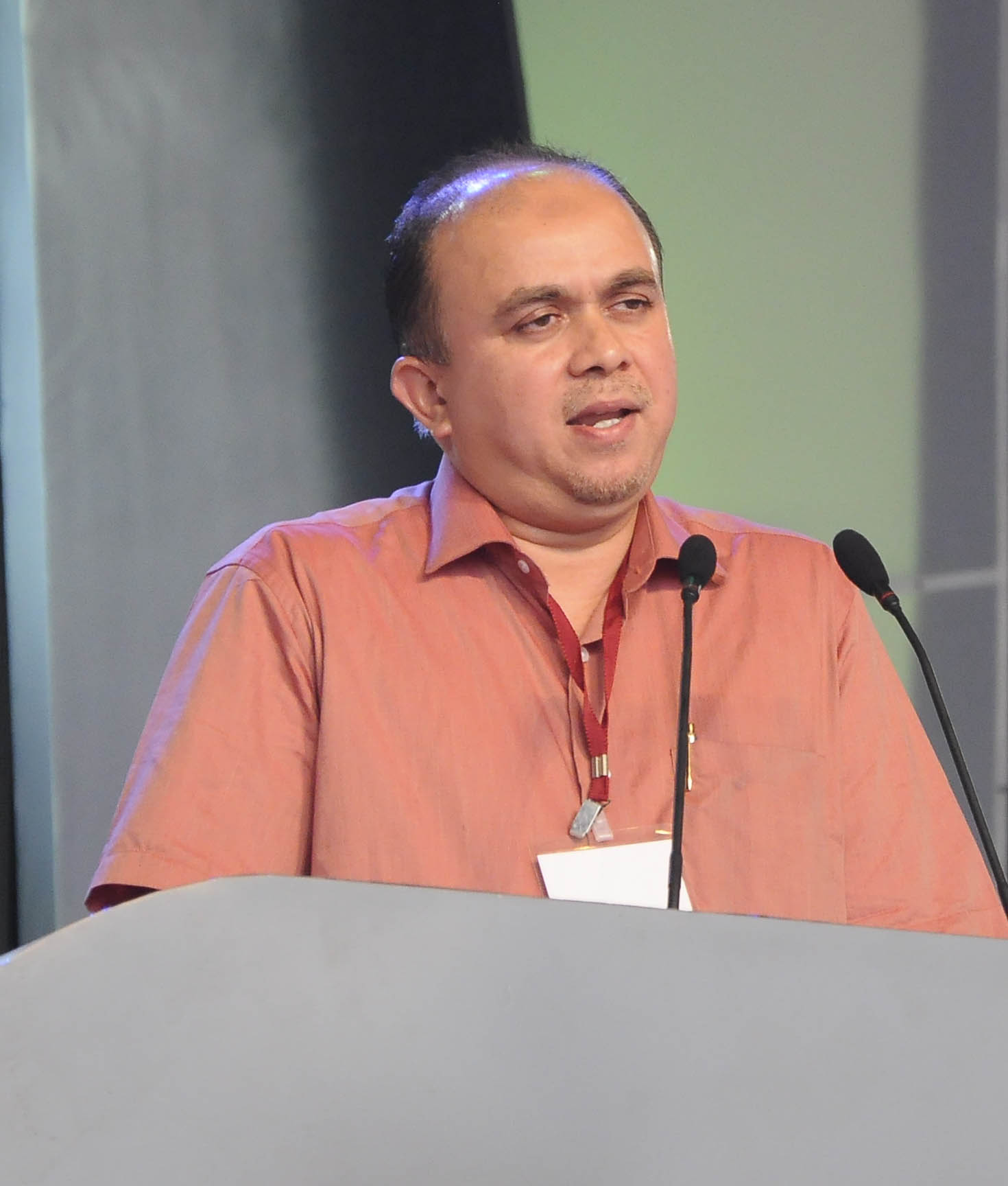 ഡോ. അബ്ദുസ്സലാം അഹ്മദ്